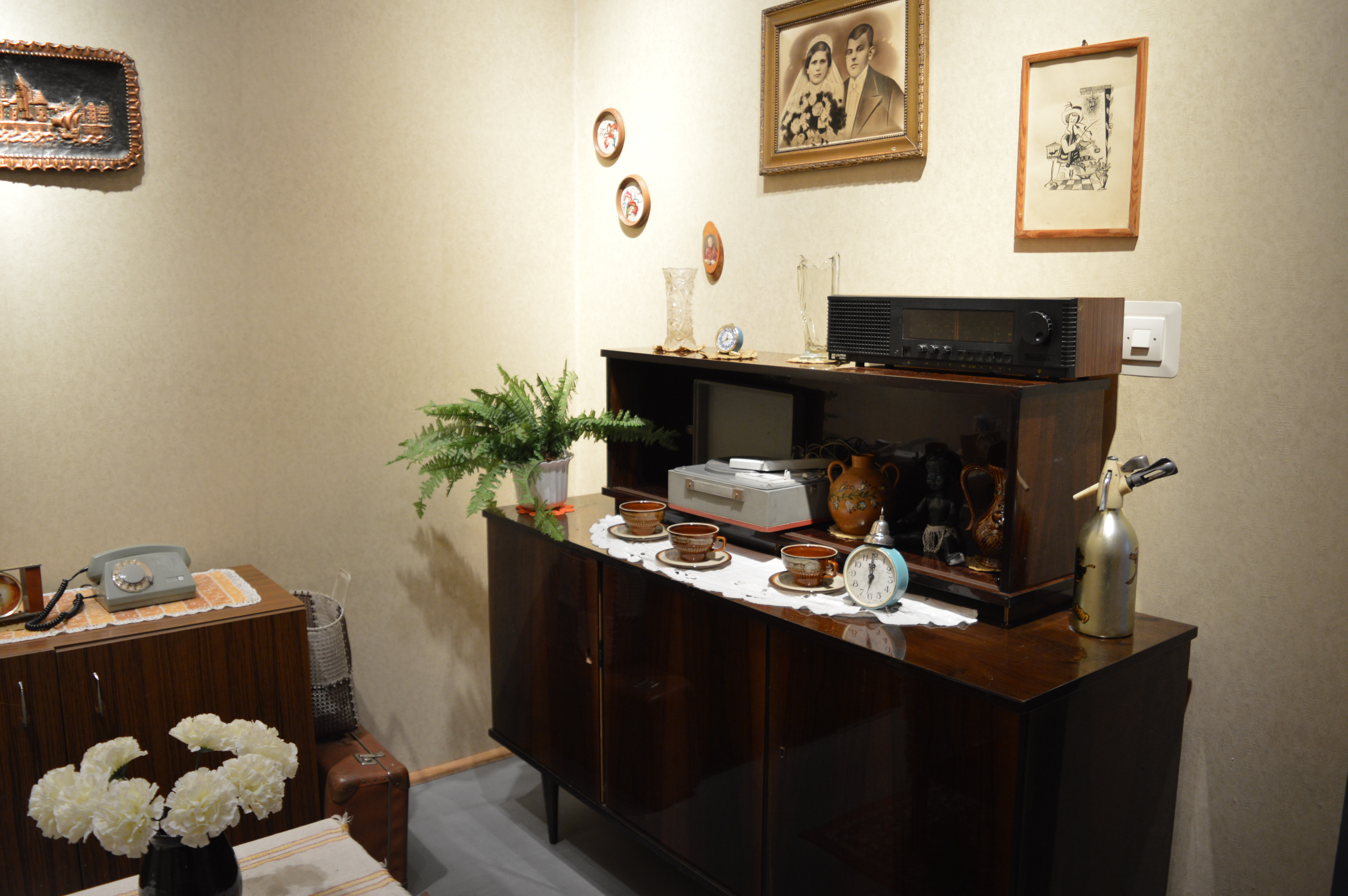 Europejskie Centrum Solidarności - sala B, pokój z epoki PRL. Na szczycie odbiornik Unitra-Diora "Taraban", produkowany od 1979 r.